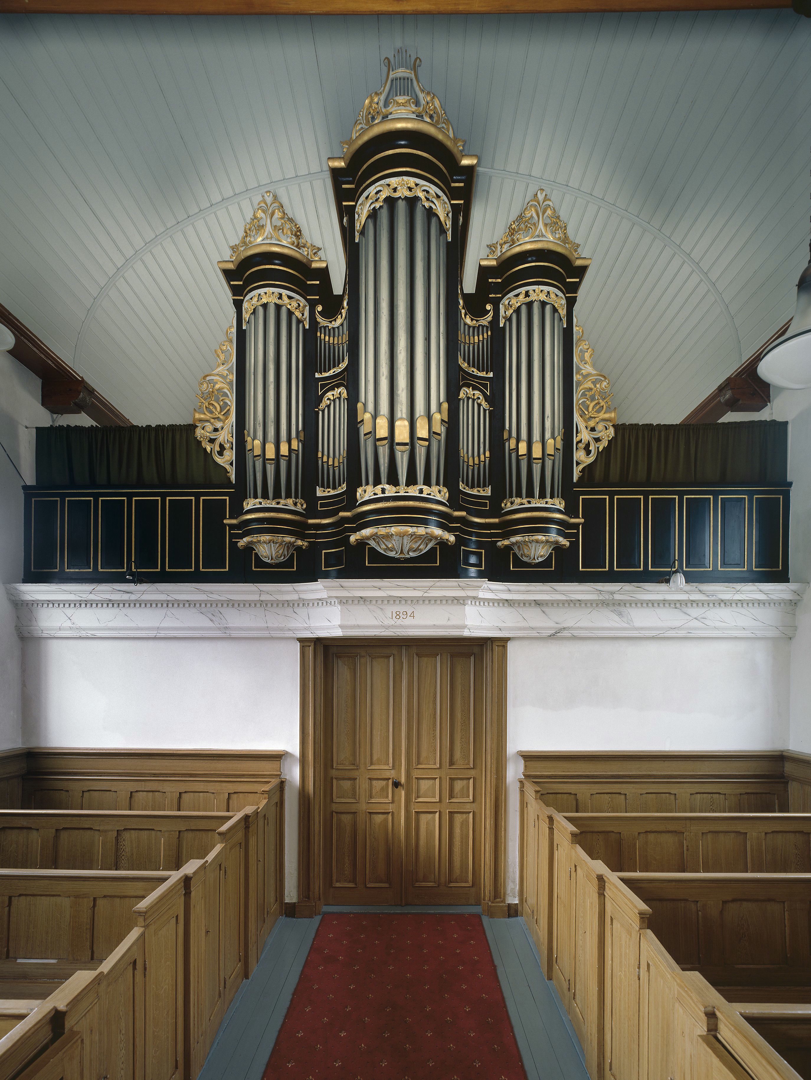 Nederlands Hervormde Kerk: Interieur, aanzicht orgel, orgelnummer 751 (opmerking: Gefotografeerd voor Het Historische Orgel in Nederland 1886-1894, bladzijde 350)